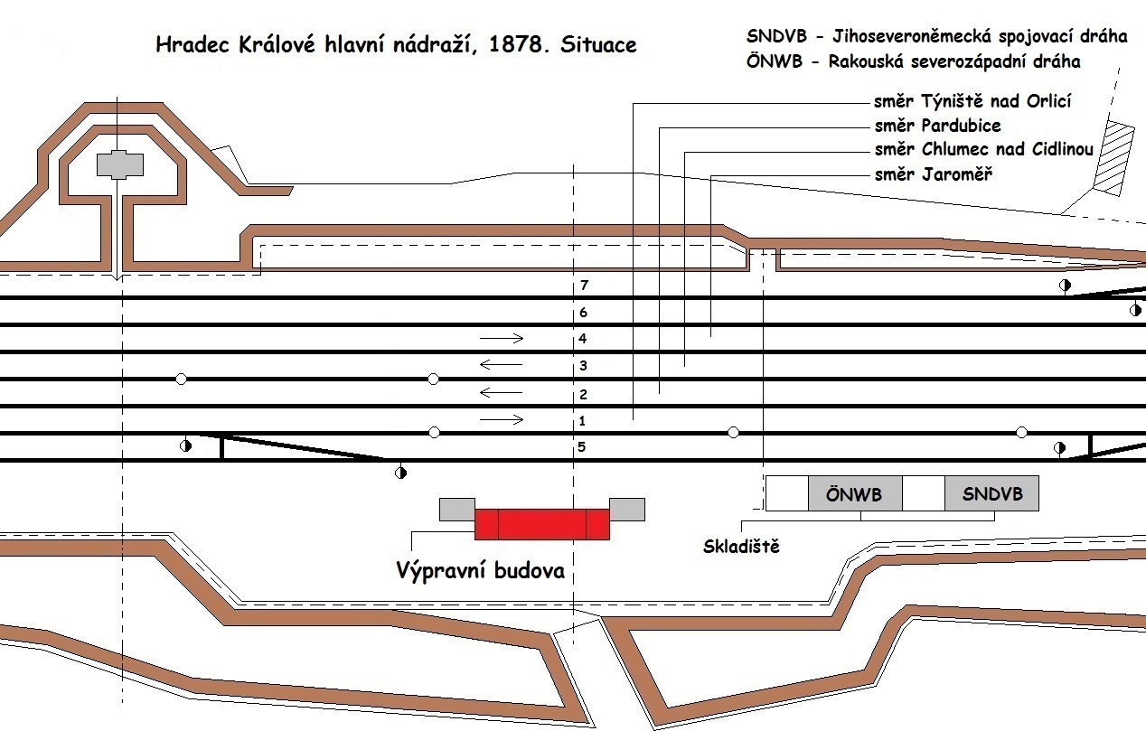 Hradec Králové hlavní nádraží, uspořádání kolejiště v roce 1878. Vytvořeno v programu malování dle výkresové dokumentace z publikace Česká nádraží, architektura a stavební vývoj, Mojmír Krejčiřík, 3. díl, první část, strana 80, ISBN 978-80-86765-09-9. (Kniha je dostupná ve Studijní a vědecké knihovně v Hradci Králové). Na požádání mohu poskytnou plnou verzi souboru ve formátu BMP 2.93 MB.